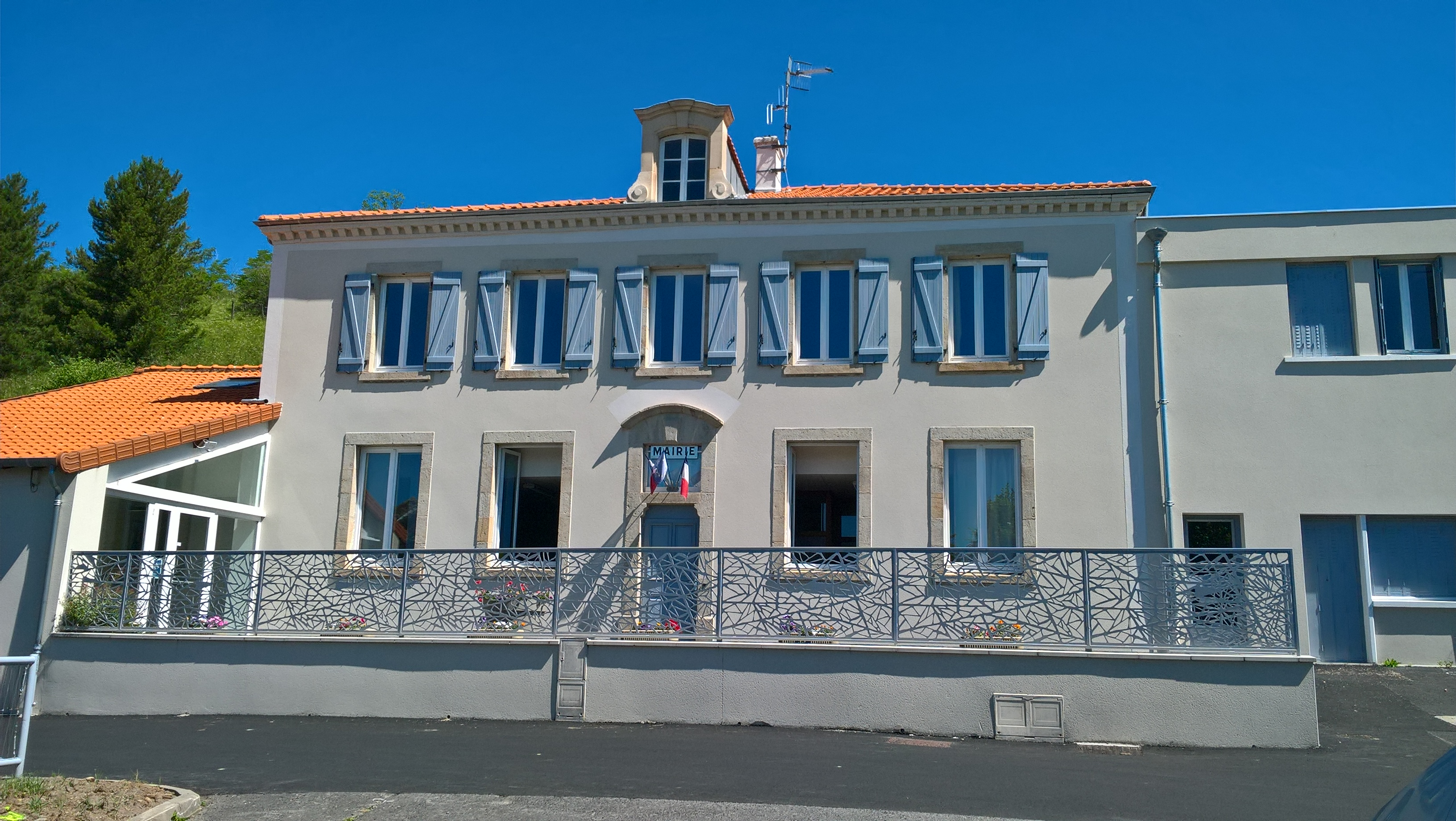 Orbeil, mairie